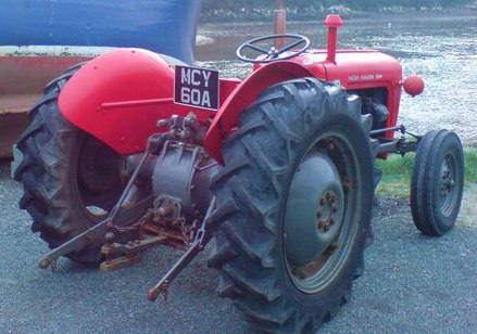 Massey-Ferguson-Traktor mit Zugpendel (zwischen den beiden Unterlenkern am Heck), Solva, Pembrokeshire, Großbritannien